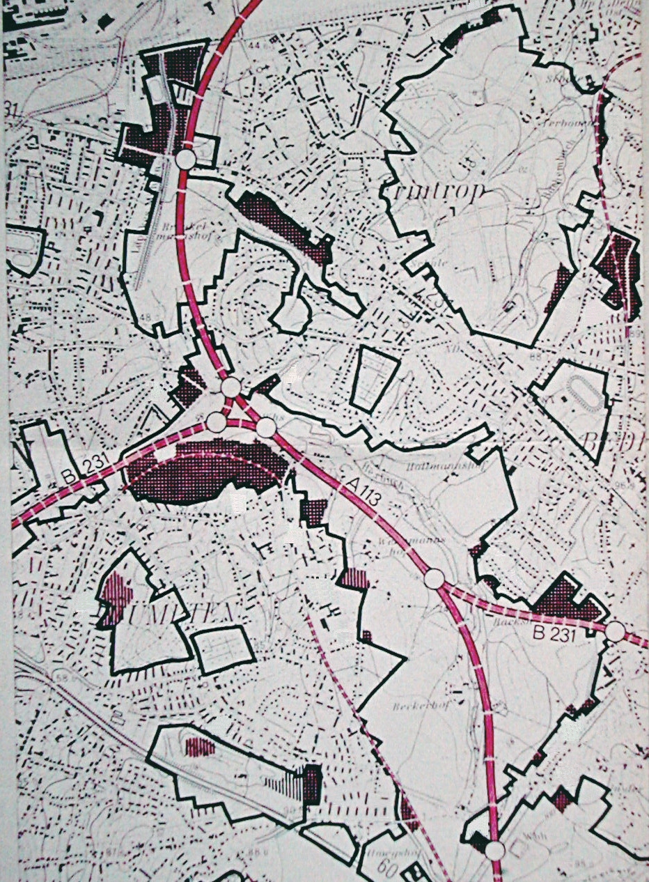 Der Verlauf der geplanten Autobahn A 31 im Hexbachtal